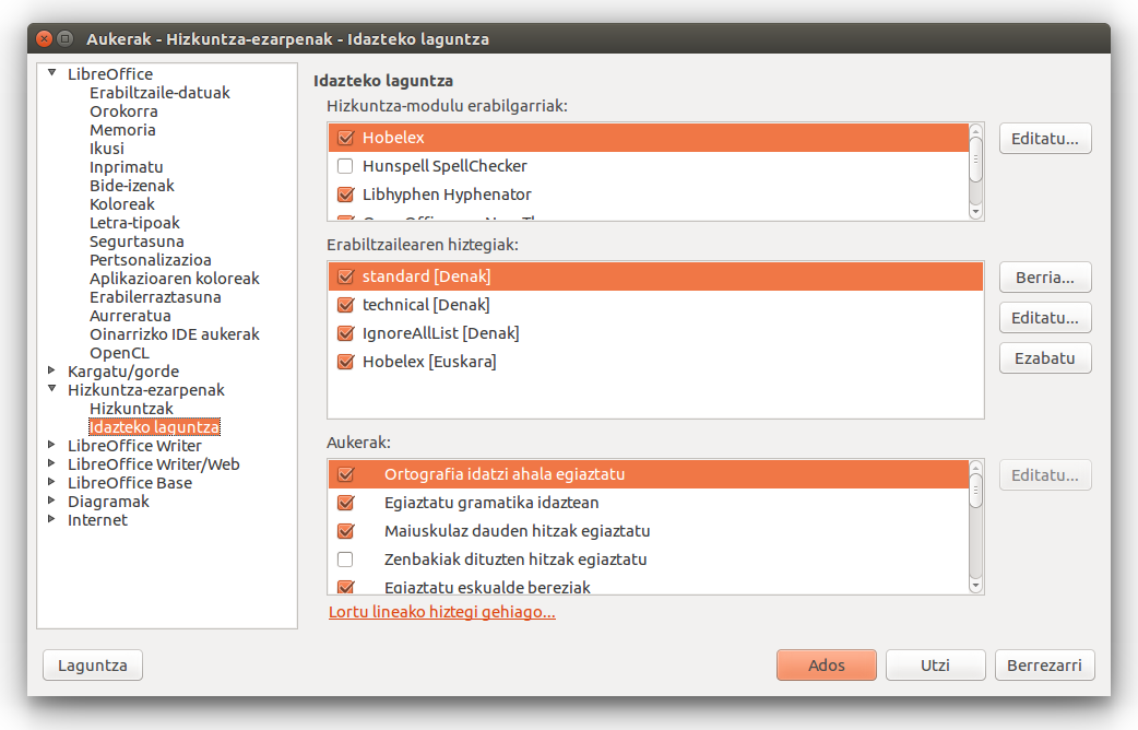 Hobelex zuzentzaile lexikoa instalatzerakoan egin behar diren azken doitzeak.